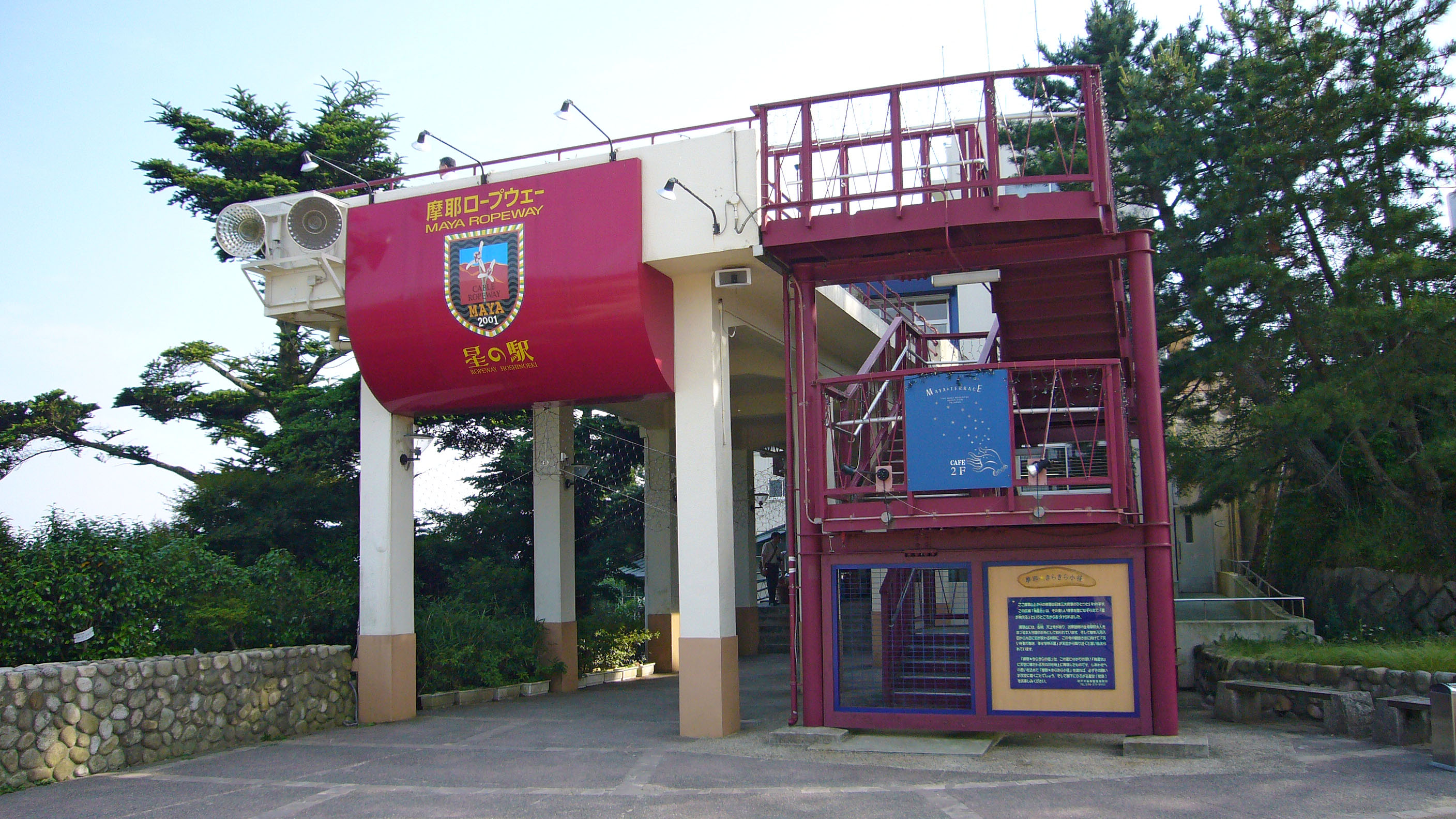 Maya Ropeway in Kobe, Japan